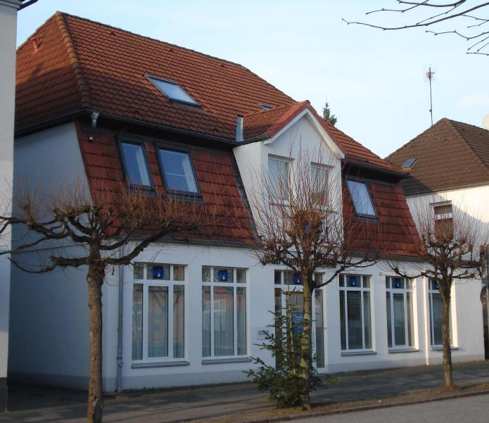 Das ehemalige Haus von Johann Georg Buchwald in Bad Schwartau